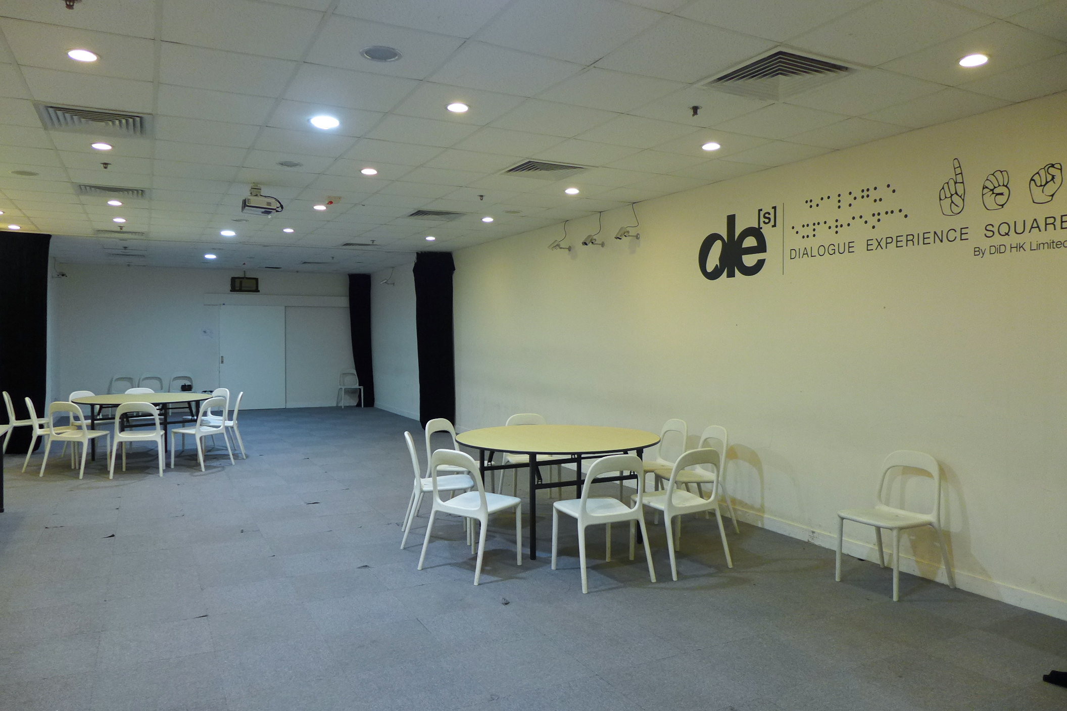 Dialogue Experience Square